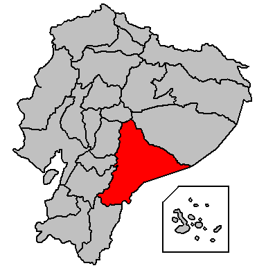 Ubicación en la República del Ecuador.